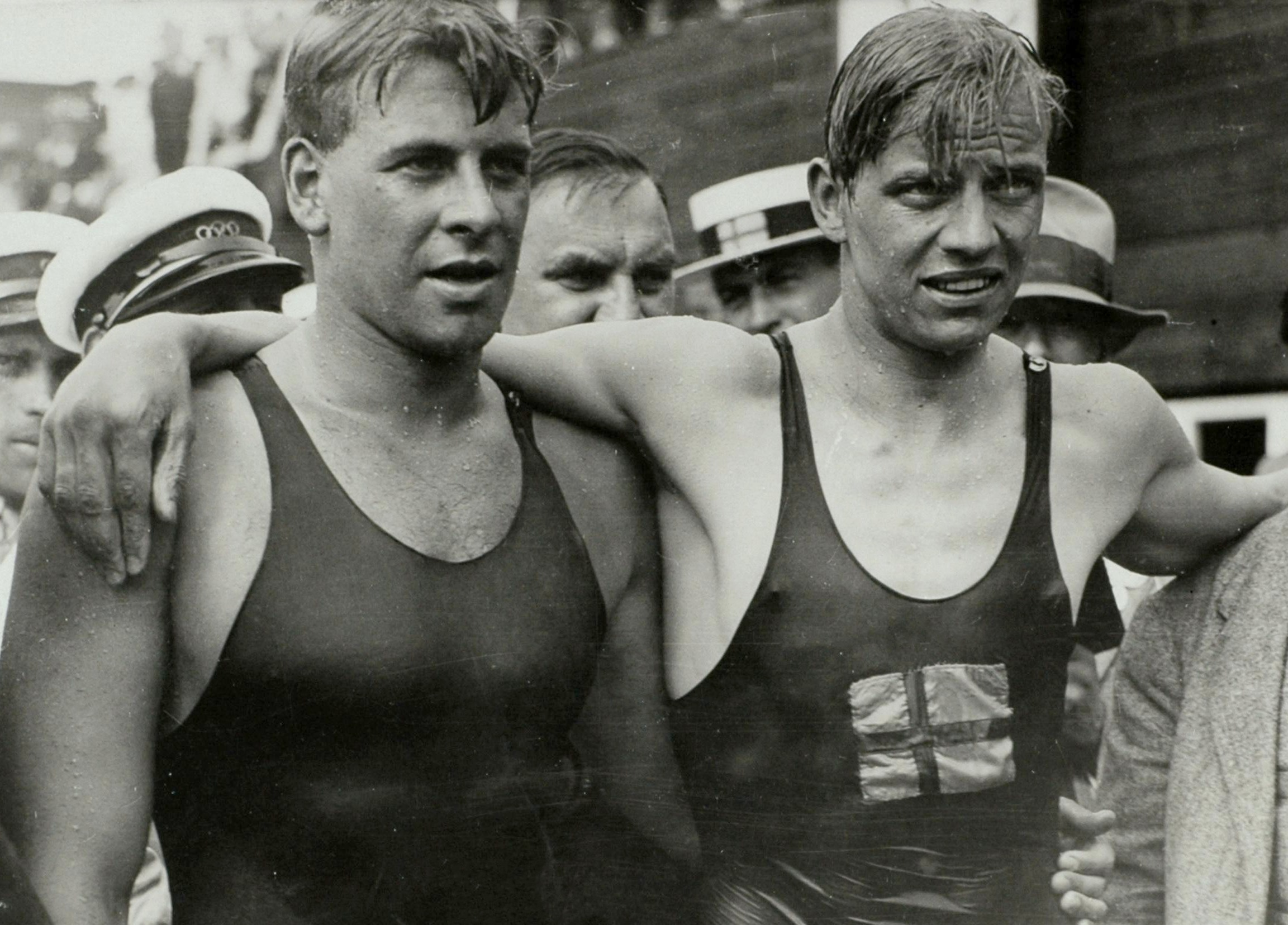 Sport. Olympische Spelen Amsterdam 1928. Zwemmen, heren : De winnaar van de 1500 m vrije slag, Arne Borg (rechts) met zijn rivaal Andrew Murray Charlton, die tweede werd.